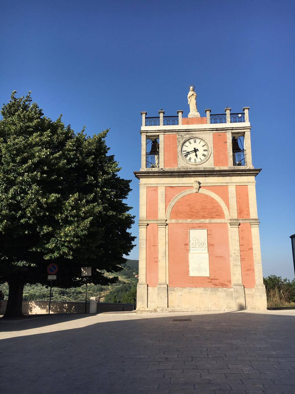 torre dell'orologio situato in piazza Ferro ad Accadia FG